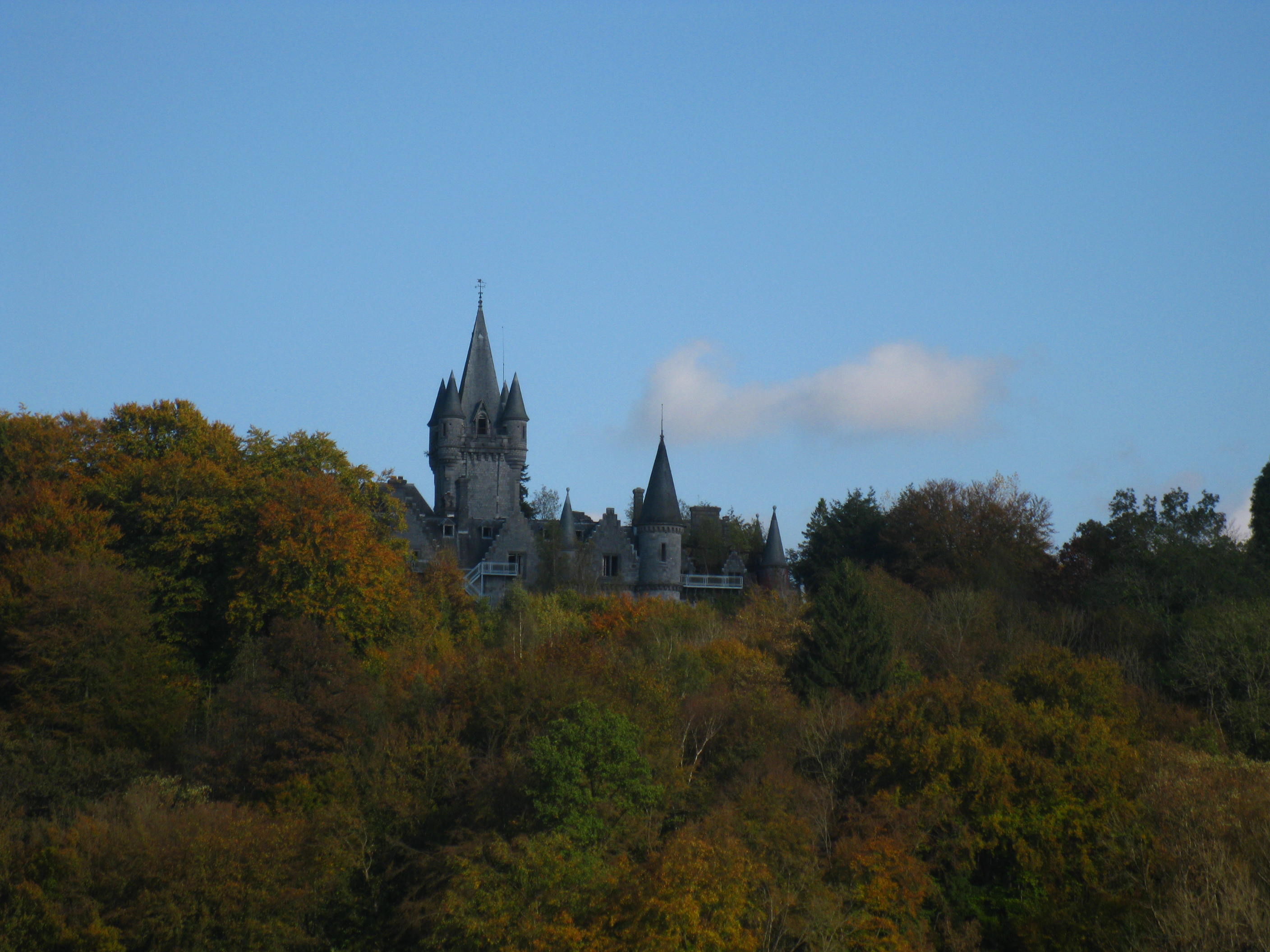 Château de Noisy - Belgique. Vue de château de Vêves.